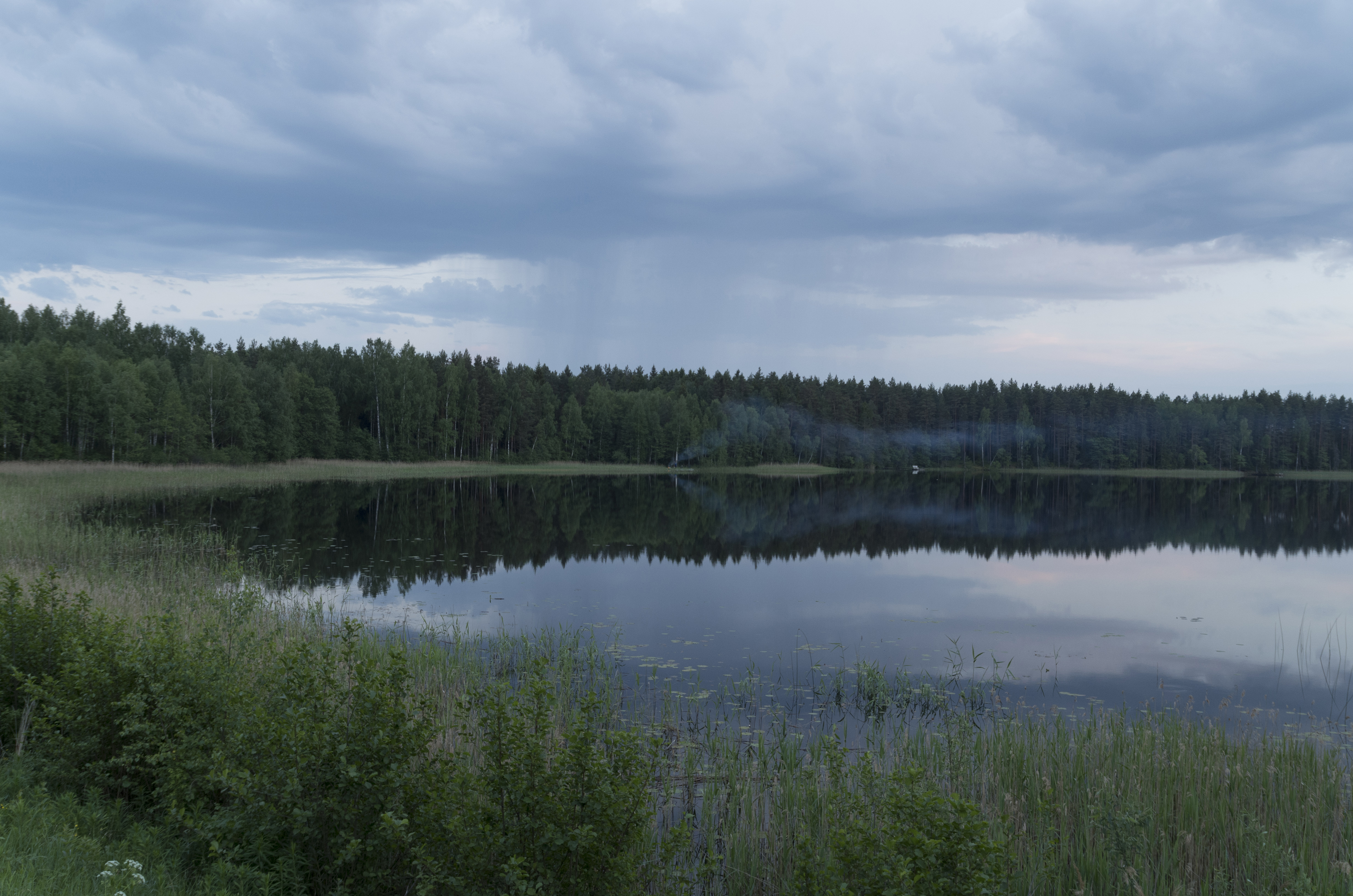 dabas parks „Silene”